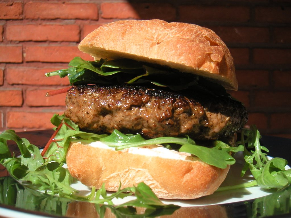 Burger